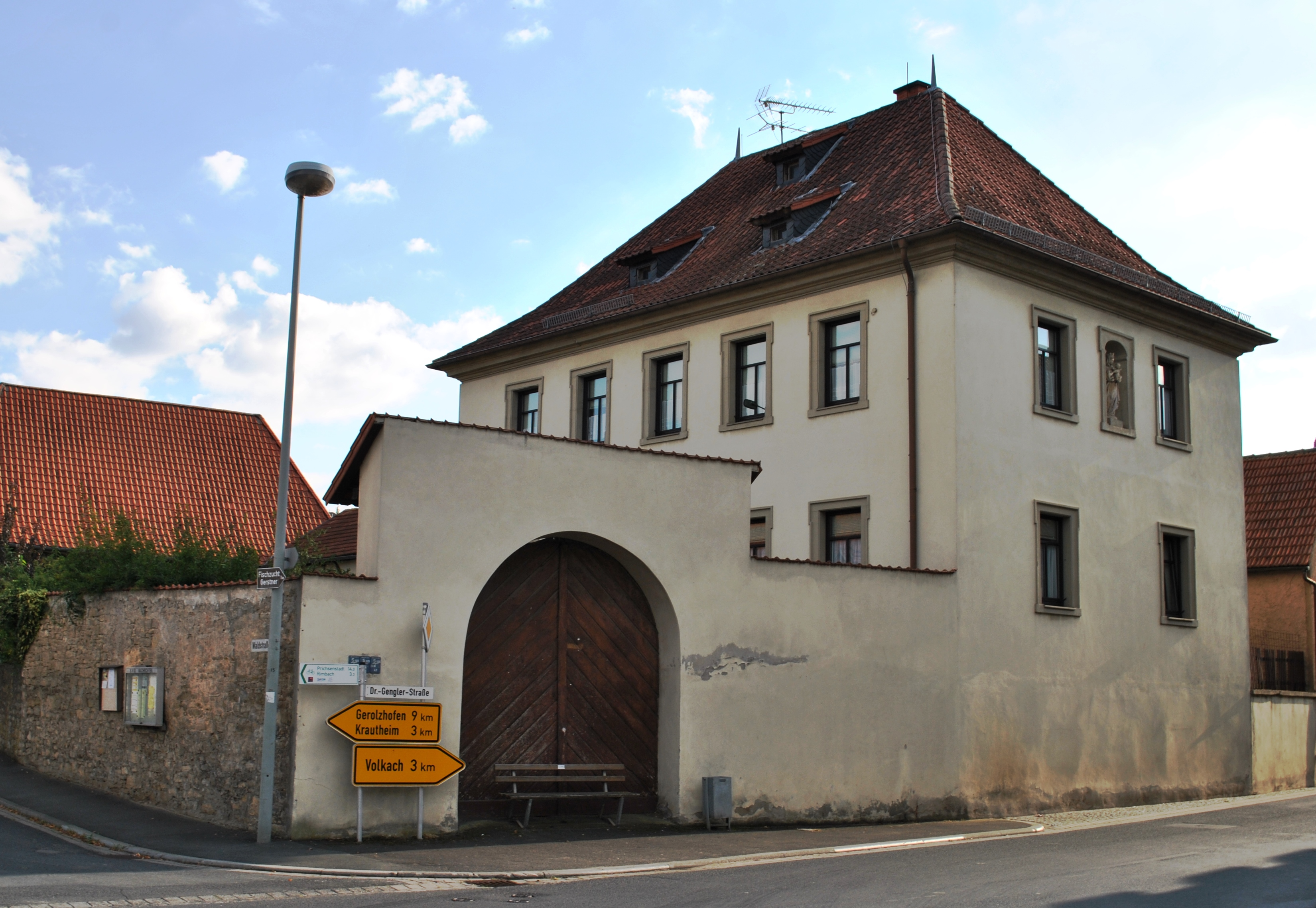 Pfarrhof, Wohnhaus Zweigeschossiger Walmdachbau mit geohrten Fensterrahmungen, in Teilen erhaltene Hofmauer und rundbogiges Portal, bezeichnet „1699“This is a photograph of an architectural monument.